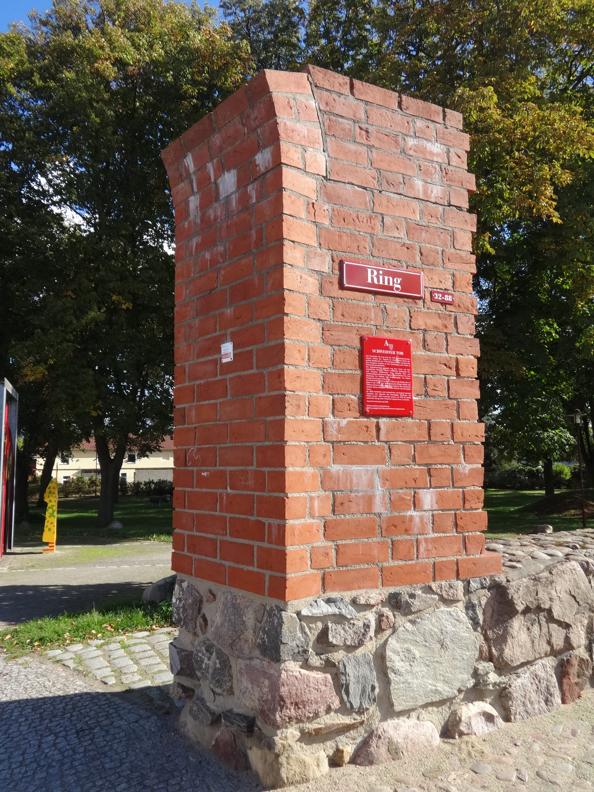 Das Schwedter Tor war eines von vier mittelalterlichen Stadttoren in Angermünde. Es wurde im 19. Jahrhundert abgerissen. In seiner Nähe steht eine Auftragsarbeit der Stadt Angermünde "GeschlossenOffen" des Künstlers Christian Uhlig.